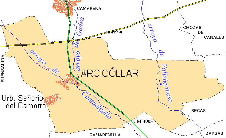 croquis del término municipal de Arcicóllar + municipios limítrofes.